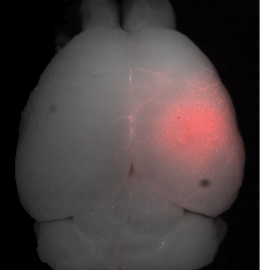 Gehirn einer Maus. Die Fluoreszenz zeigt die lokale Öffnung der Blut-Hirn-Schranke an.